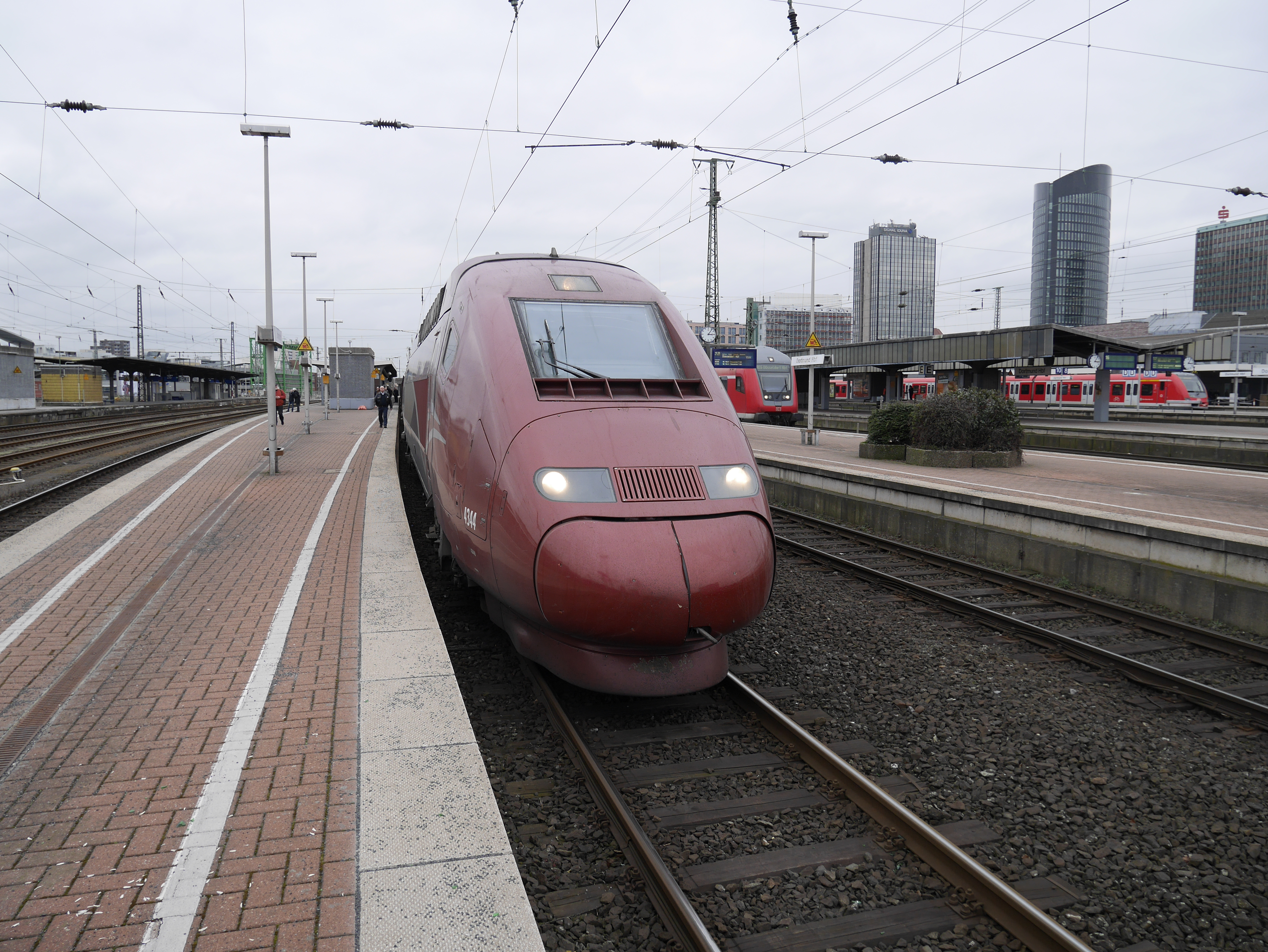 Der dritte Thalys, der jemals ab Dortmund Hbf fährt